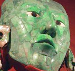 Fotografía de una cabeza de jade maya expuesta en el Museo de Antropología e Historia de la Cd. de México.